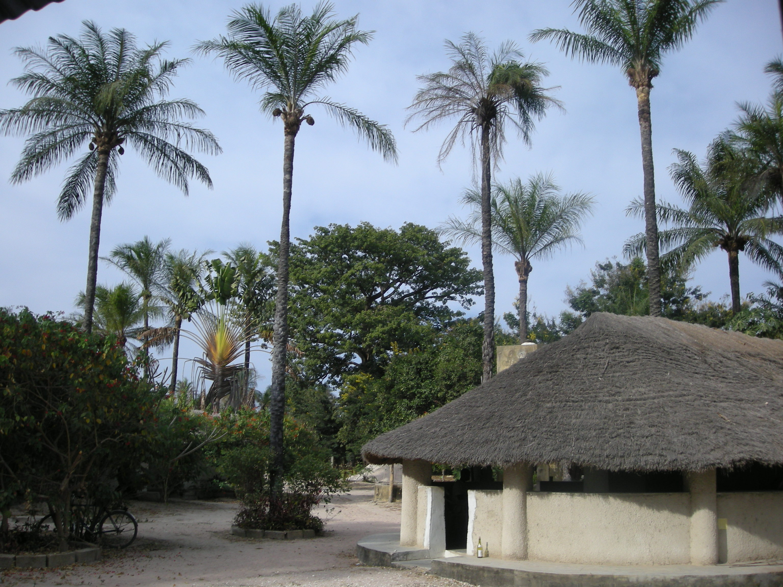 Campement villageois dans le style traditionnel à Oussouye (Casamance, Sénégal)